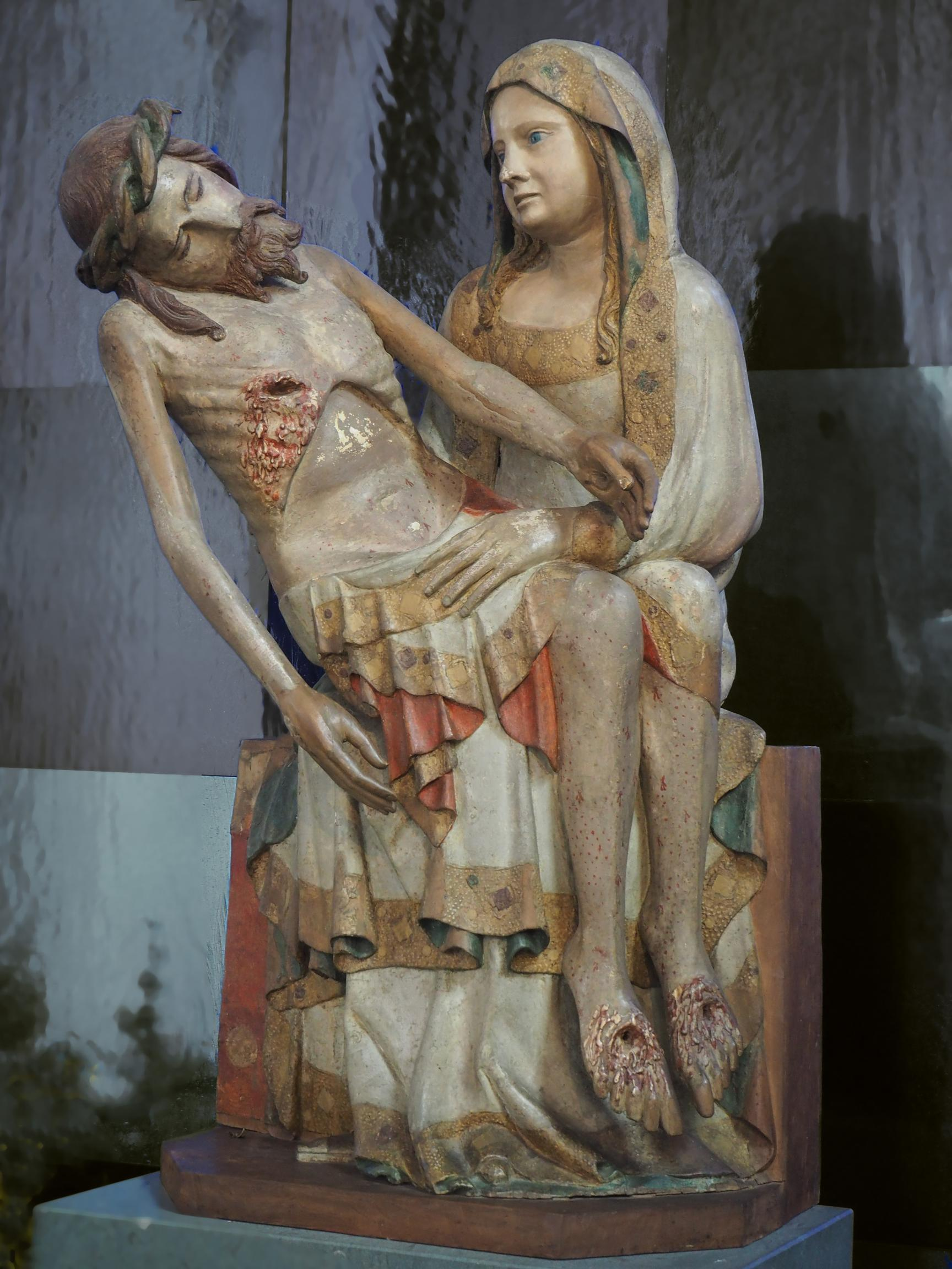 Delbrück, Piéta aus den 14. Jh. in der Kirche St. Johannes Baptist (Hintergrund verändert), Foto: April 2015